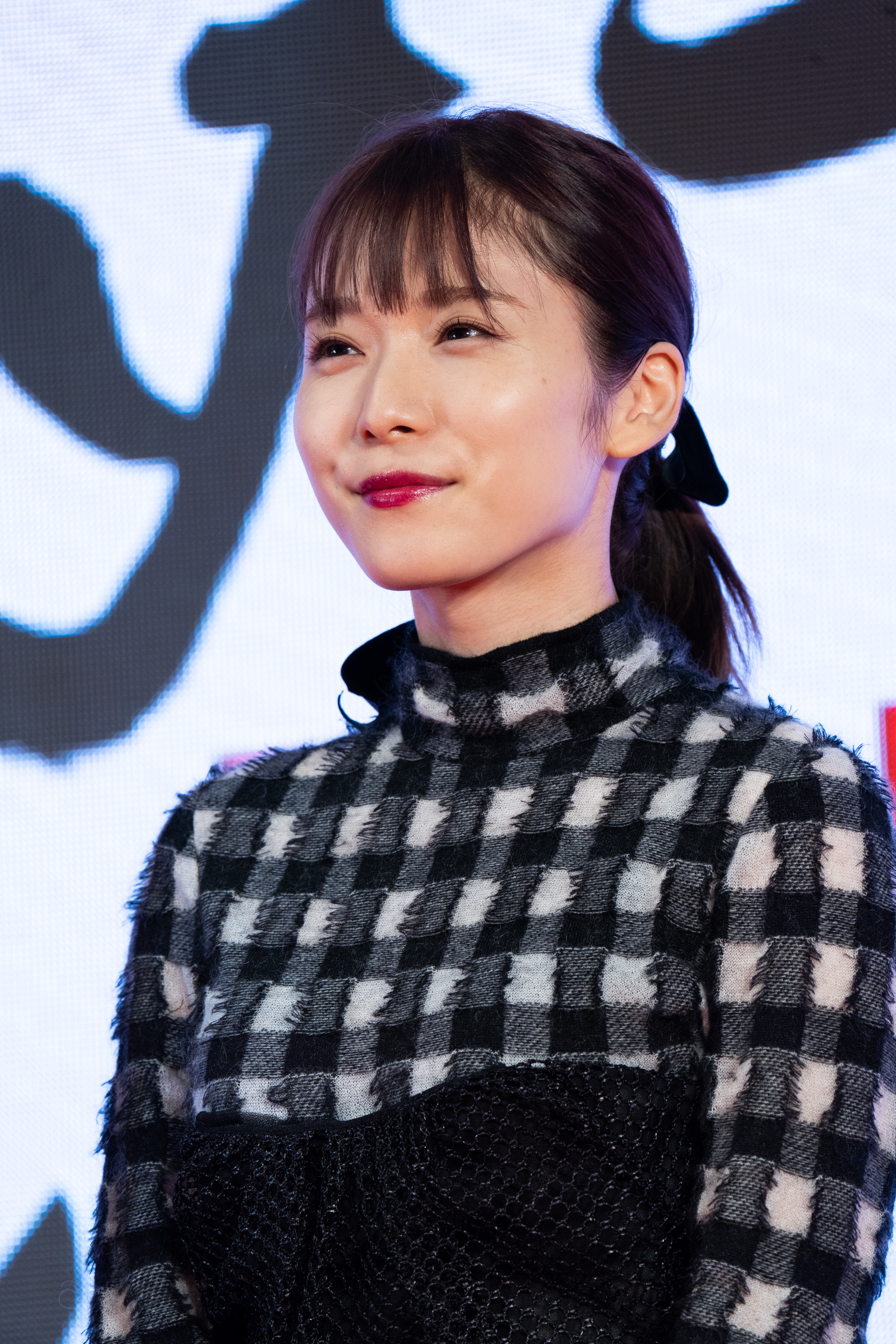 第32回 東京国際映画祭 オープニングセレモニー 松岡茉優 (ひとよ)